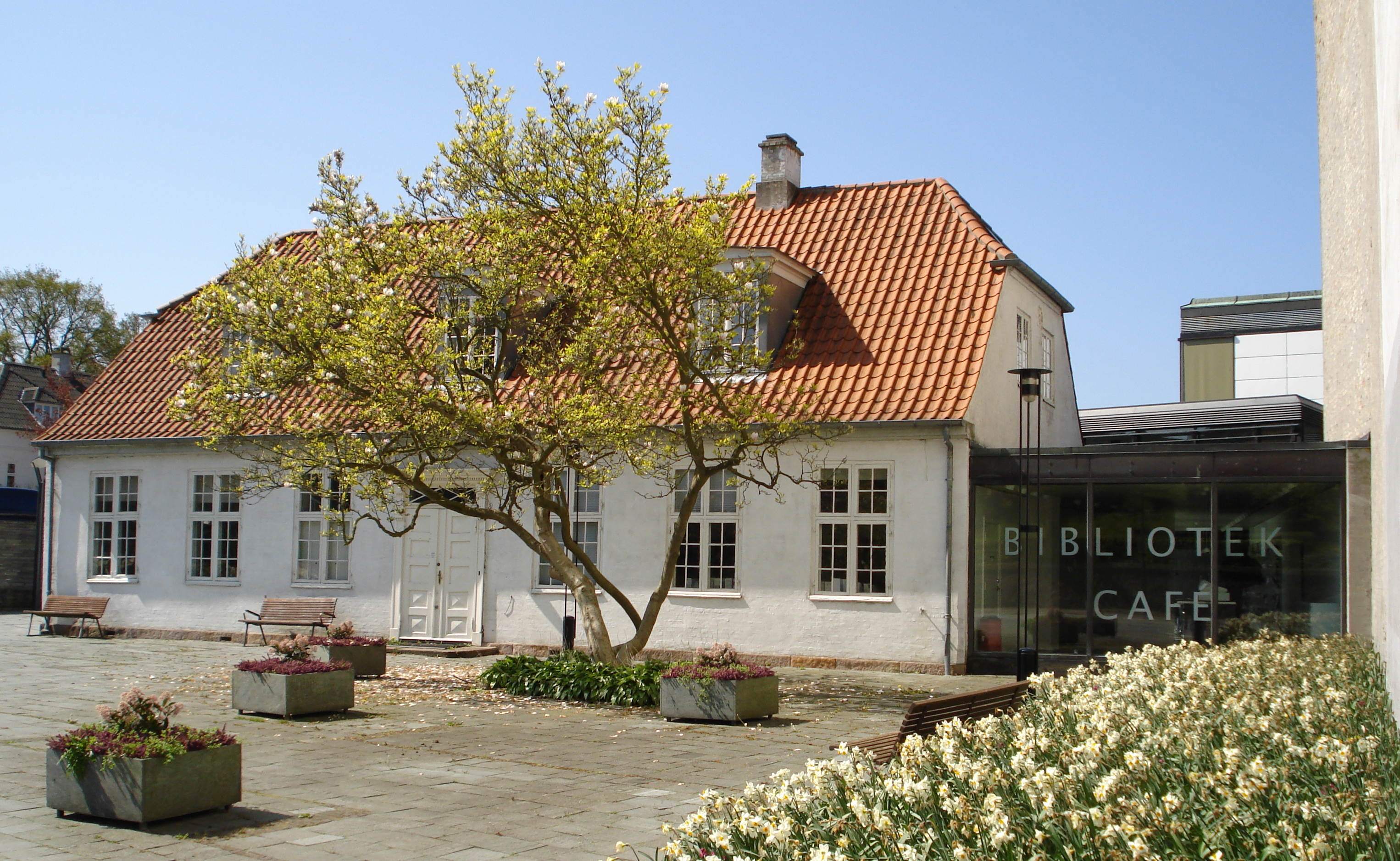 Lyngby Hovedgade nr. 28, Gramlille, Stadsbiblioteket i Kongens Lyngby (Lyngby Hovedgade No. 28, Gramlille, Library in Kongens Lyngby)